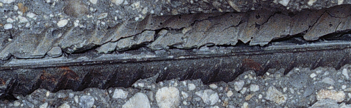 Einbetonierte BetonstahlRebar in concrete